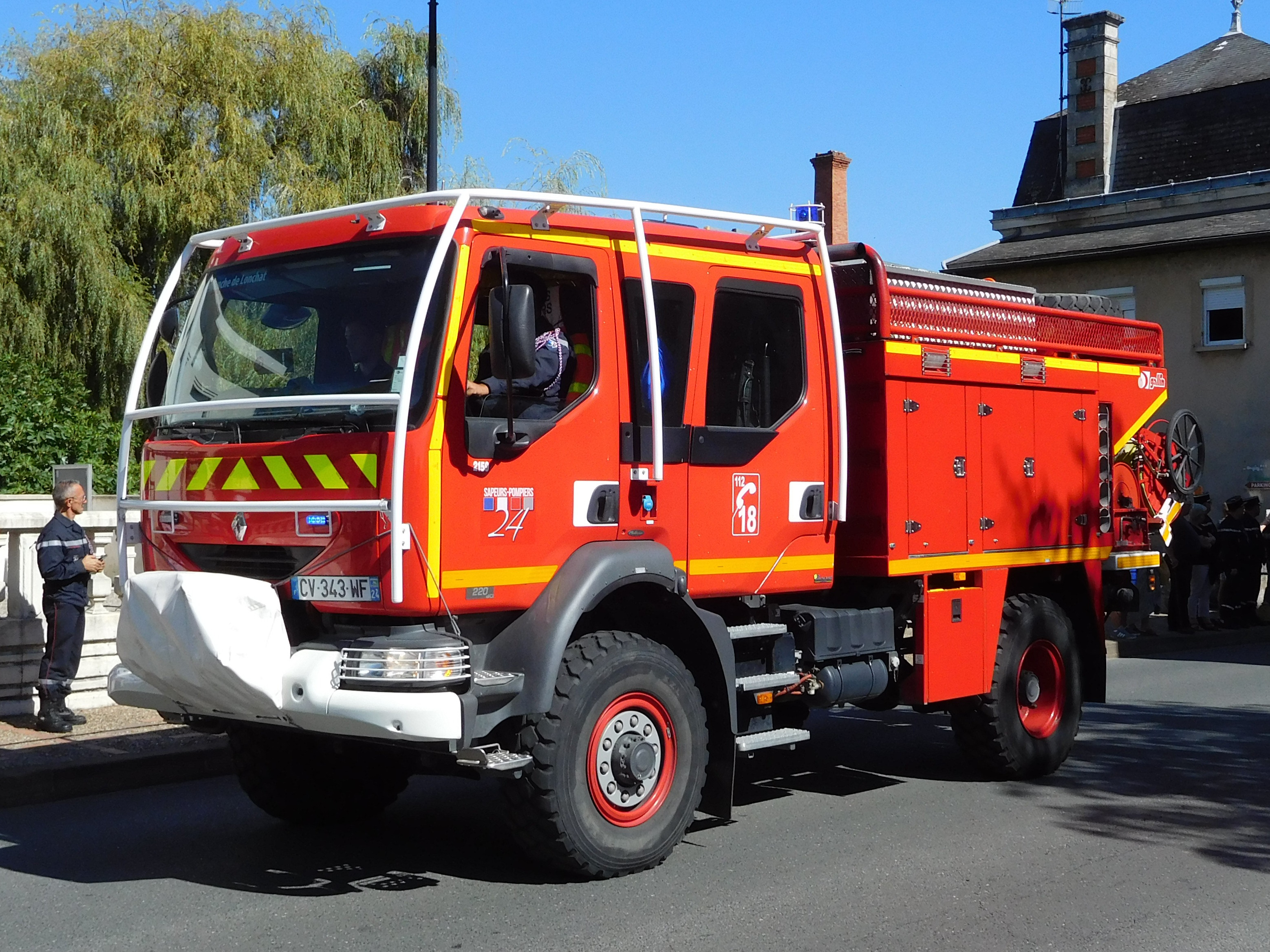 Défilant dans les rues de Mussidan, camion-citerne rural moyen (CCRM), châssis Renault Kerax 220 dCi équipé par Gallin, de la caserne de Villefranche-de-Lonchat. Lors du 87e congrès départemental des sapeurs-pompiers de la Dordogne, Mussidan, France.